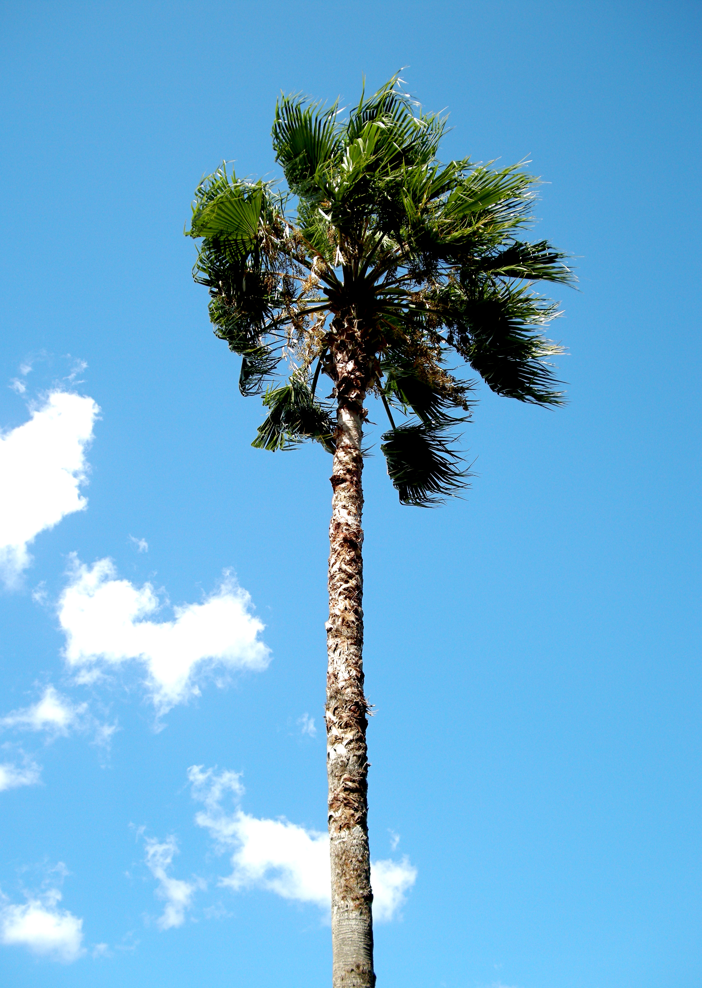 A palm (Washingtonia robusta ?) at Osaka Gakuin University (Osaka, Japan).